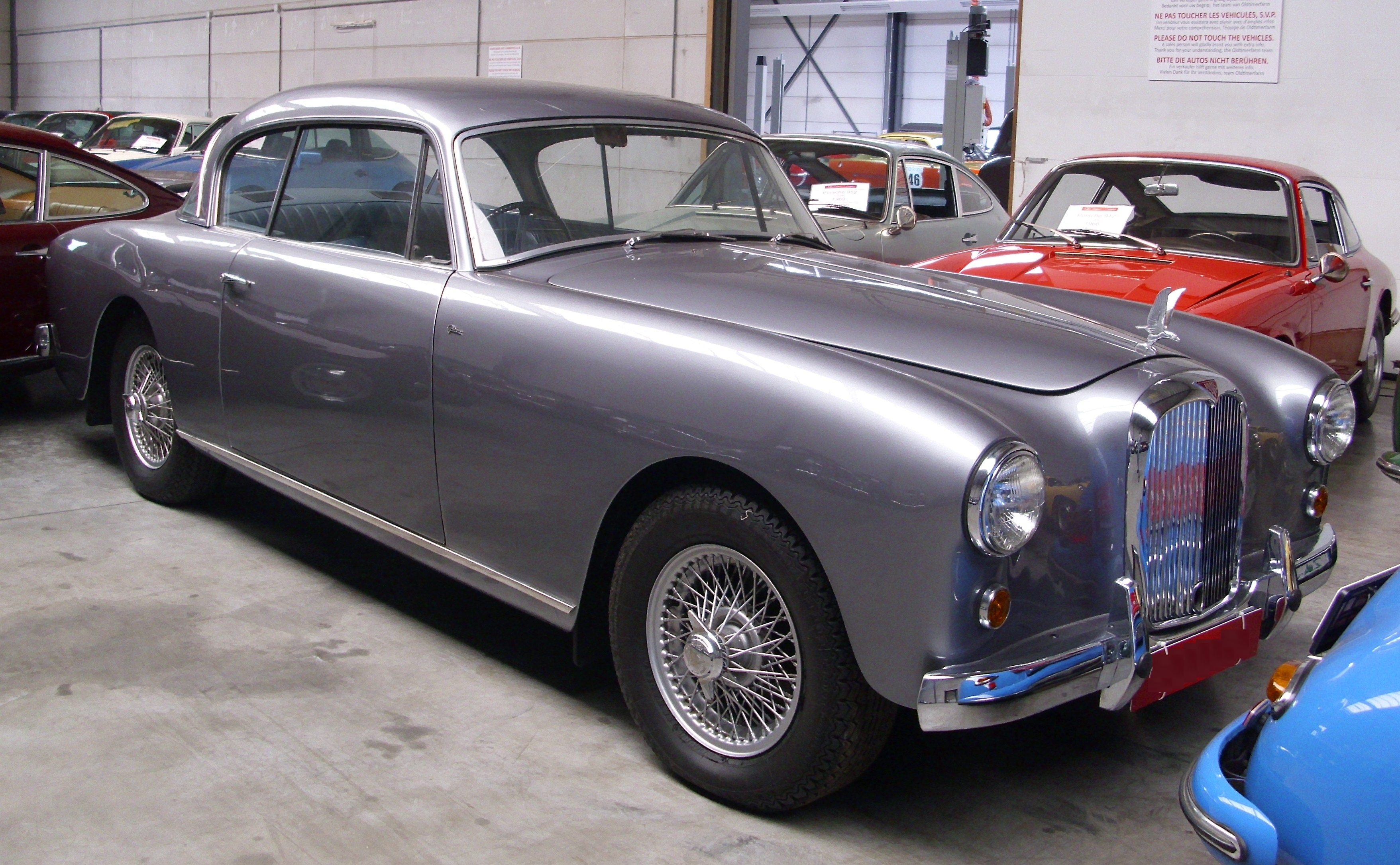 Alvis 3 Litres TC 108G Coupé von Graber 1955